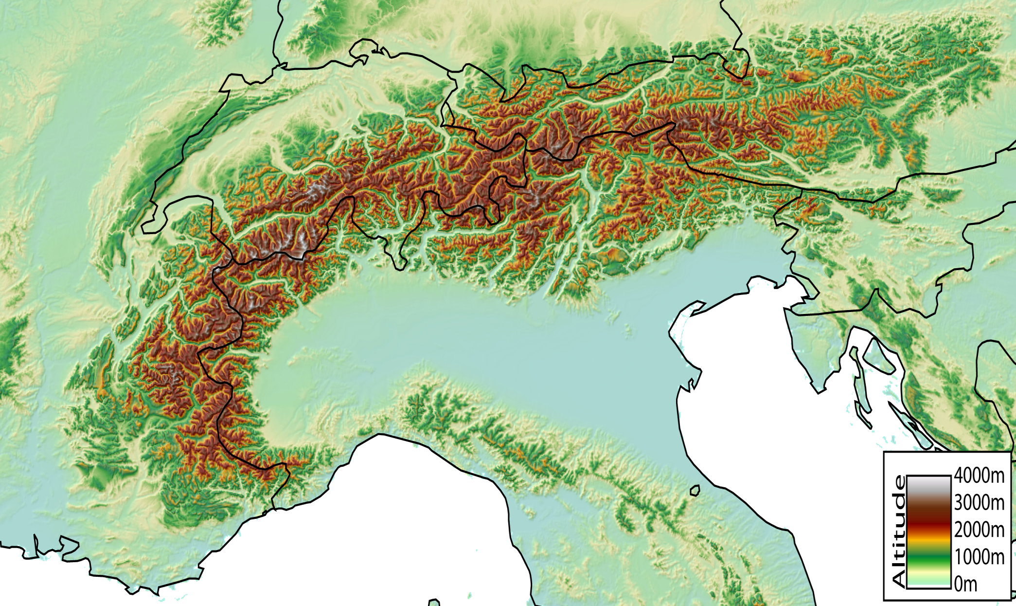 Mapa digital de los Alpes, desde Niza hasta Viena Digital Elevation Model of the Alps, from Nice (France) to Vienna (Austria) created by jide from the GTOPO30 dataset (pixel size ~1km).